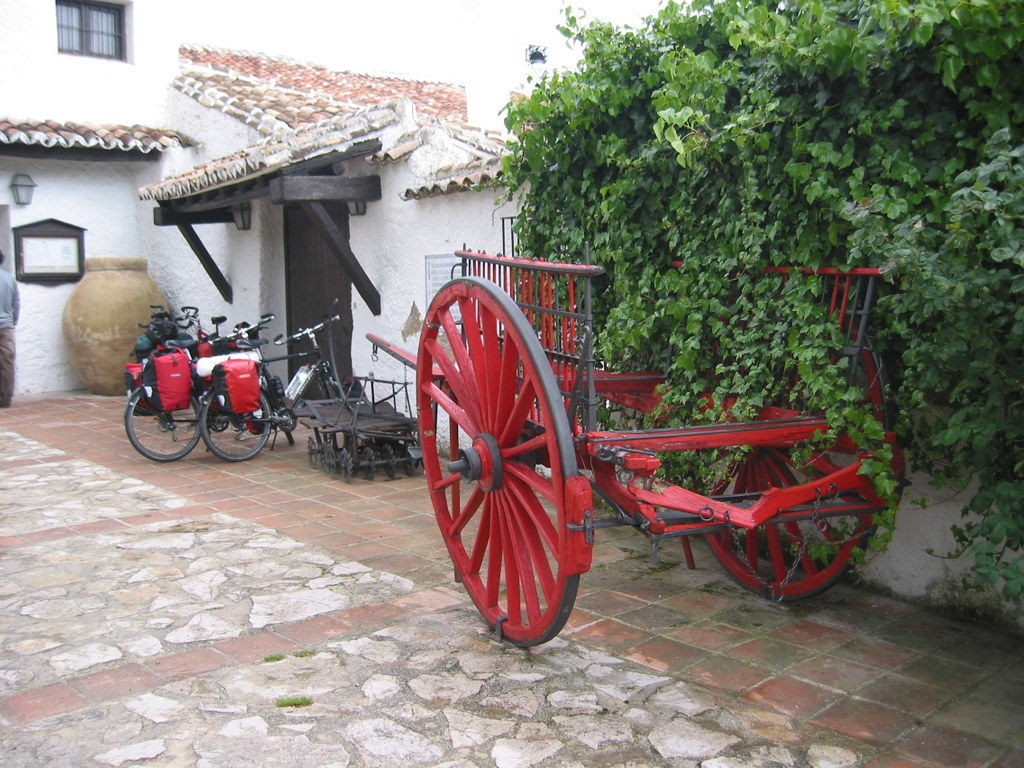 Venta de Alfarnate, España.